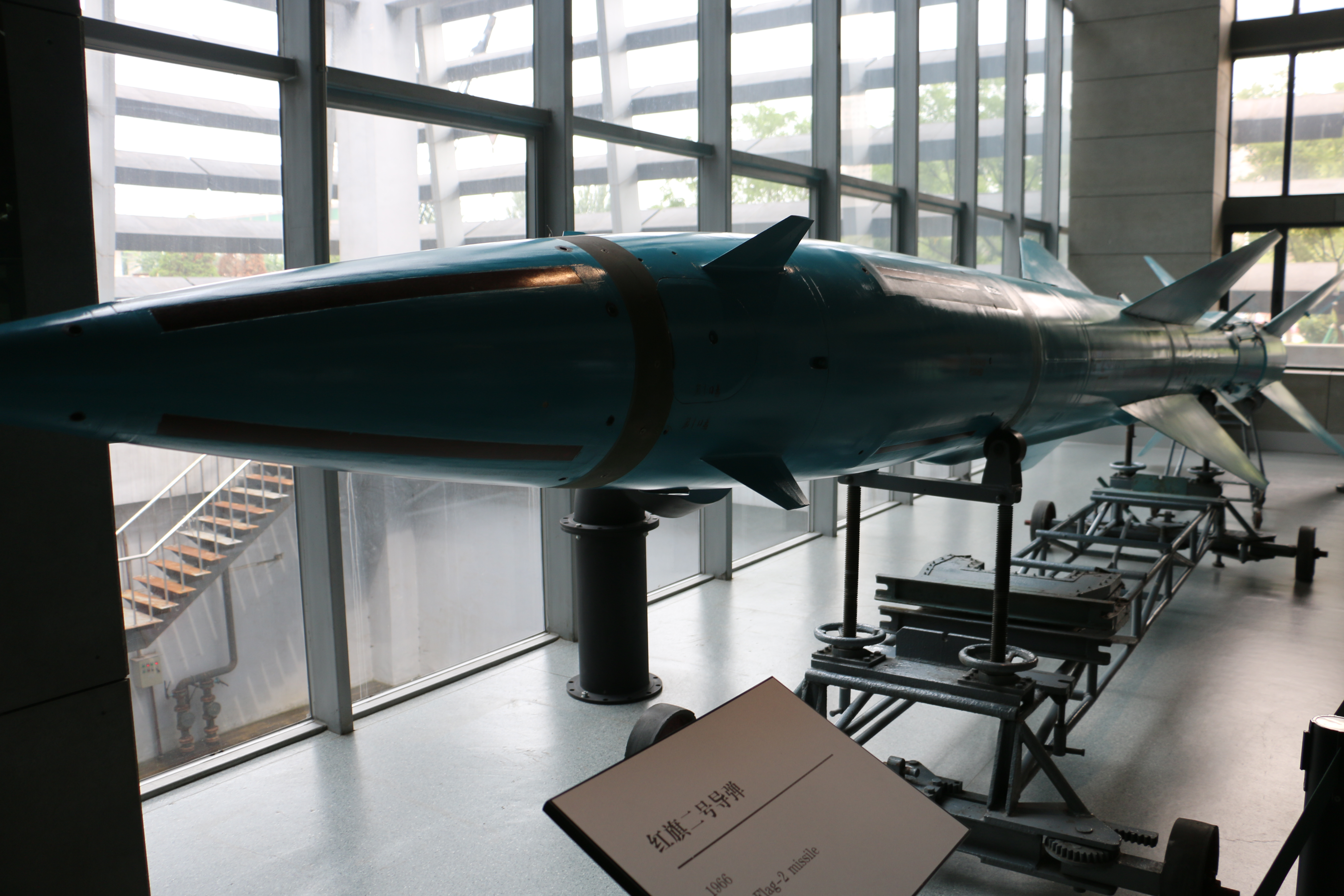 红旗二防空导弹，中国工业博物馆藏